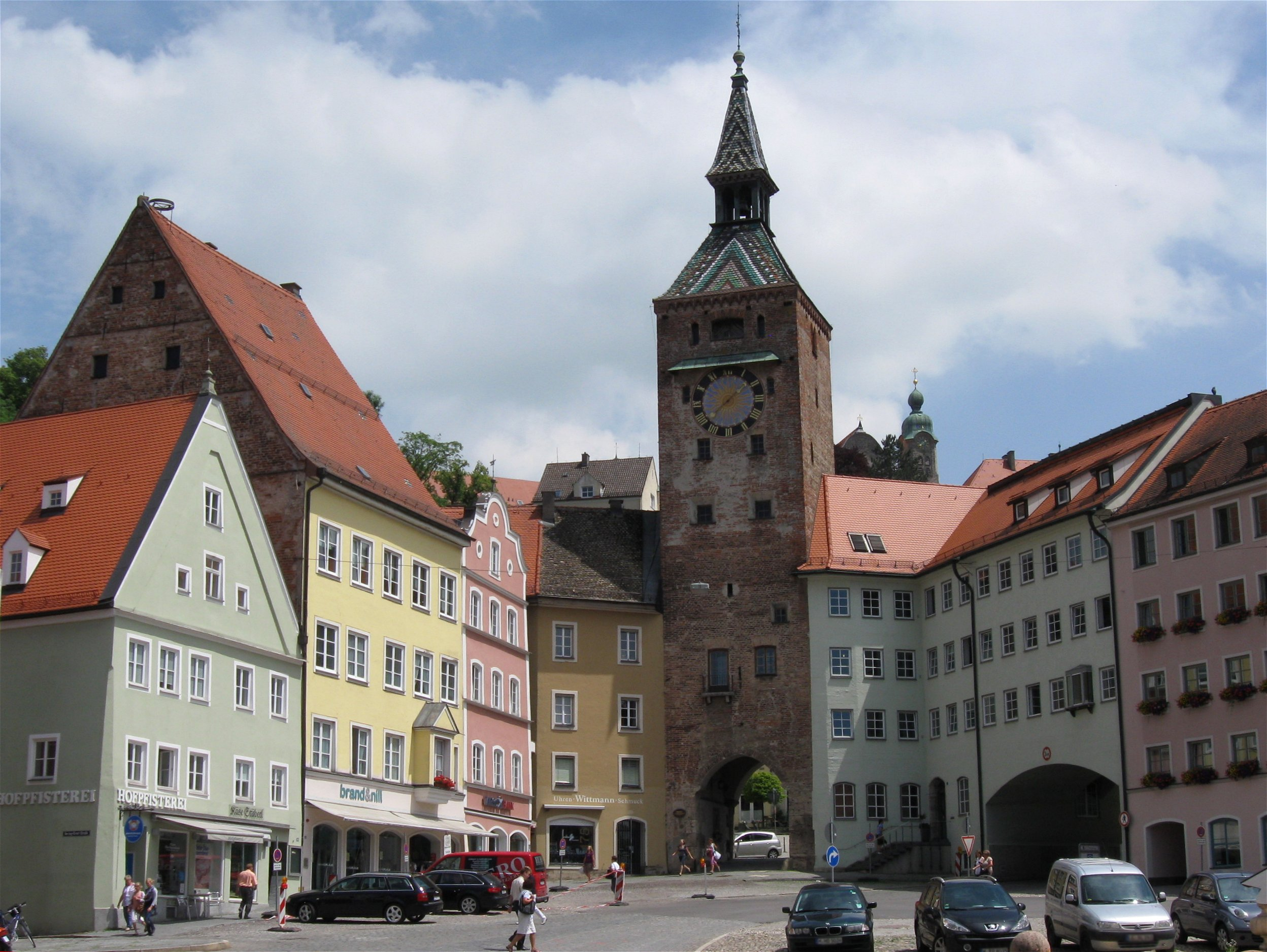 Hauptplatz 184; Schöner Turm oder Schmalzturm, ehemaliges Stadttor, sog. Schöner Turm oder Schmalzturm, siebengeschossiger Torturm mit laternenbekröntem Zeltdach, Stadttor mit Unterbau wohl nach 1270, obere Geschosse und Dachwerk um 1450; mit Ausstattung; siehe Stadtbefestigung. D-1-81-130-105